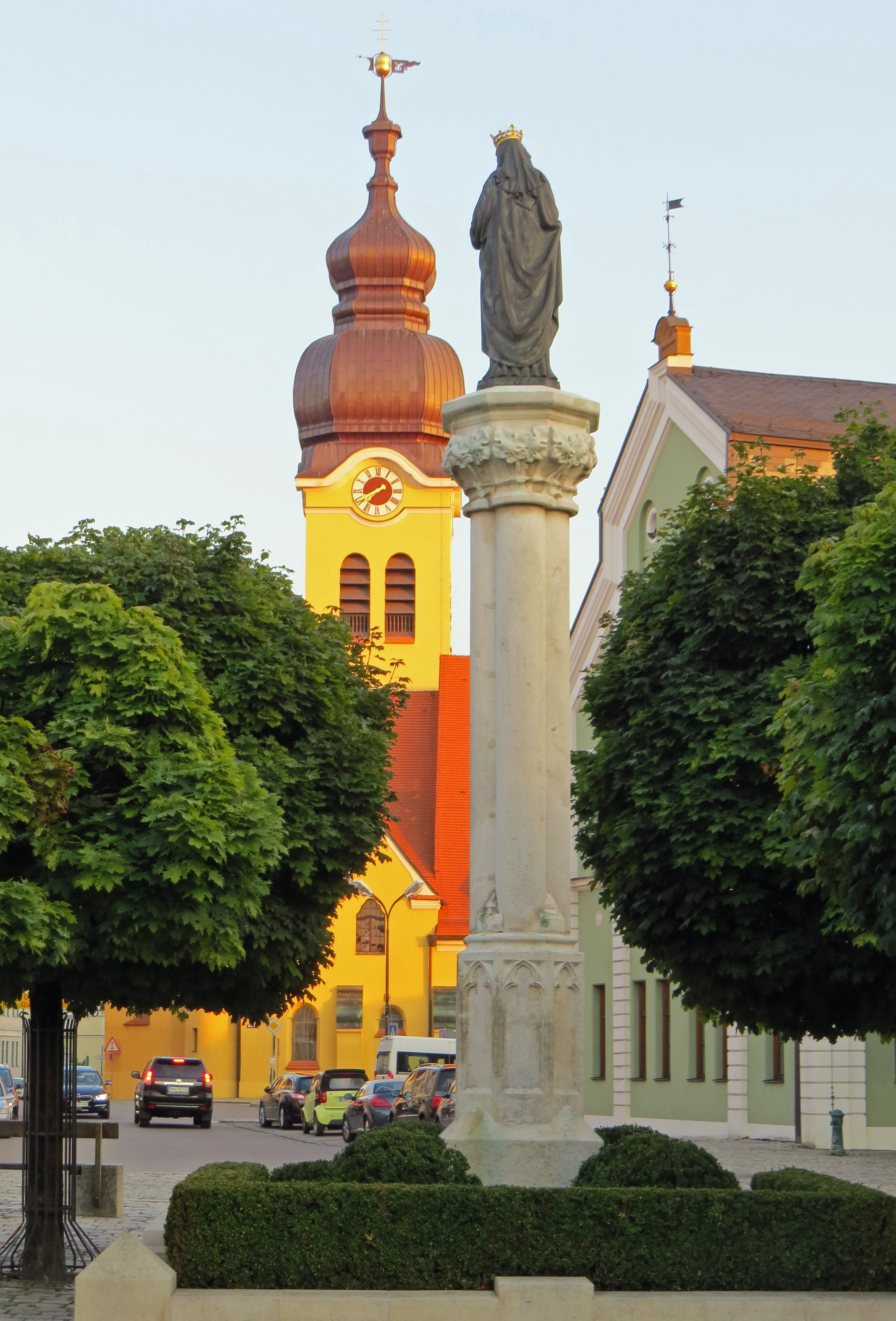 Mariensäule und Pfarrkirche in Wolnzach